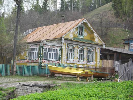 Uncommon house in city Plyos, Ivanovo Oblast, Russia (2005) — Необычный домик в городе Плёс (2005)